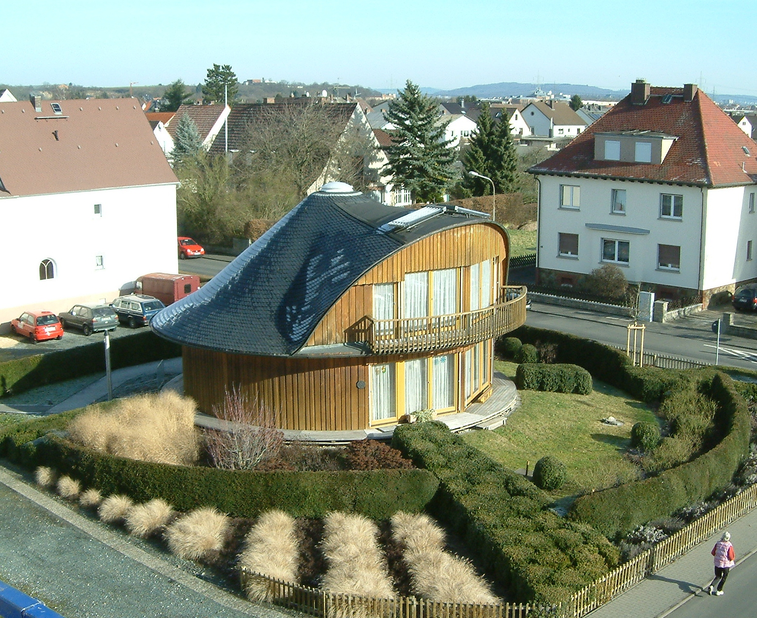 Drehhaus der ersten Generation in 35452 Heuchelheim Sanderweg/Ludwig Rinn Straße